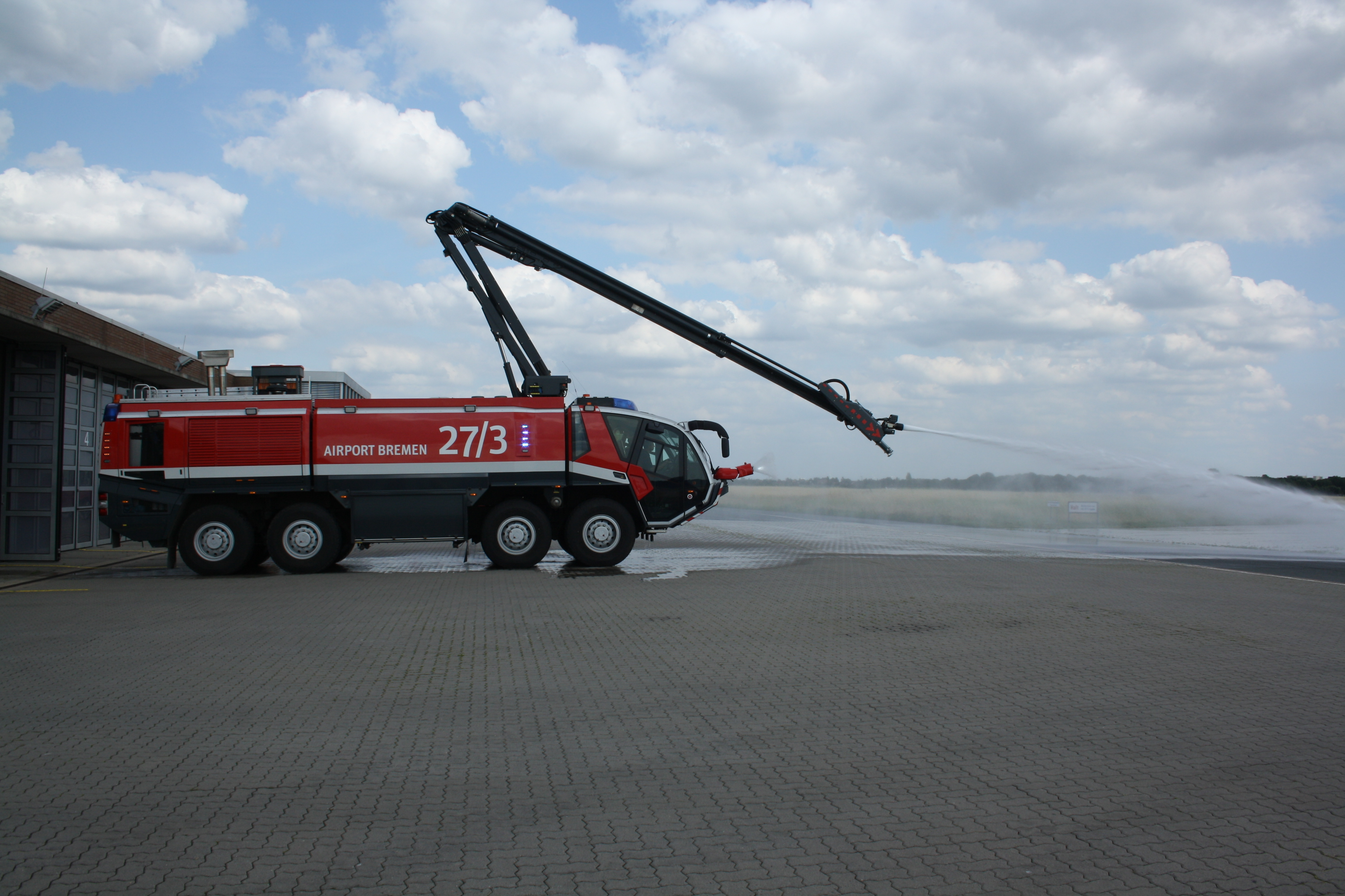 Flugfeldlöschfahrzeug Rosenbauer Panther 8x8, Flughafenfeuerwehr Bremen. Löscharm (Stinger, HRET)